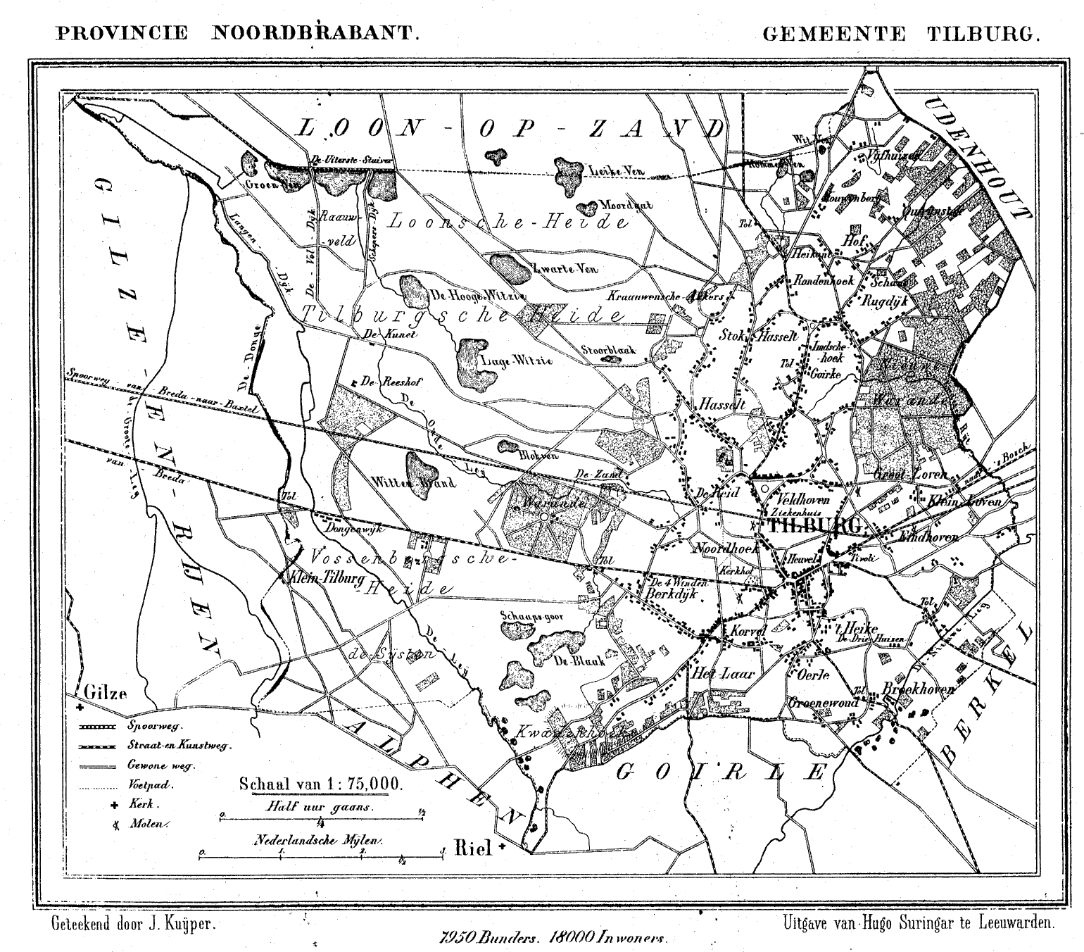 Nederland, Noord-Brabant, Gemeente Tilburg